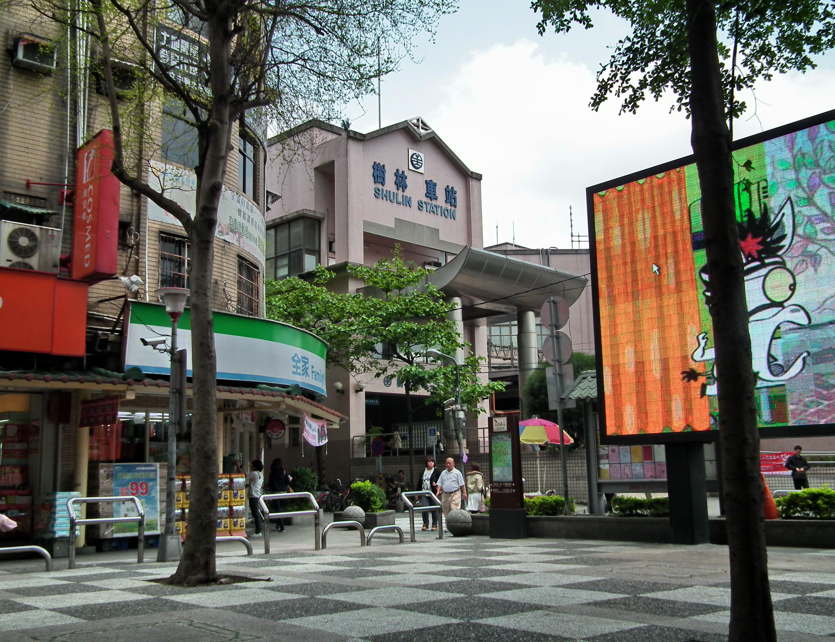 中文（台灣）: 臺灣鐵路管理局樹林車站後站。